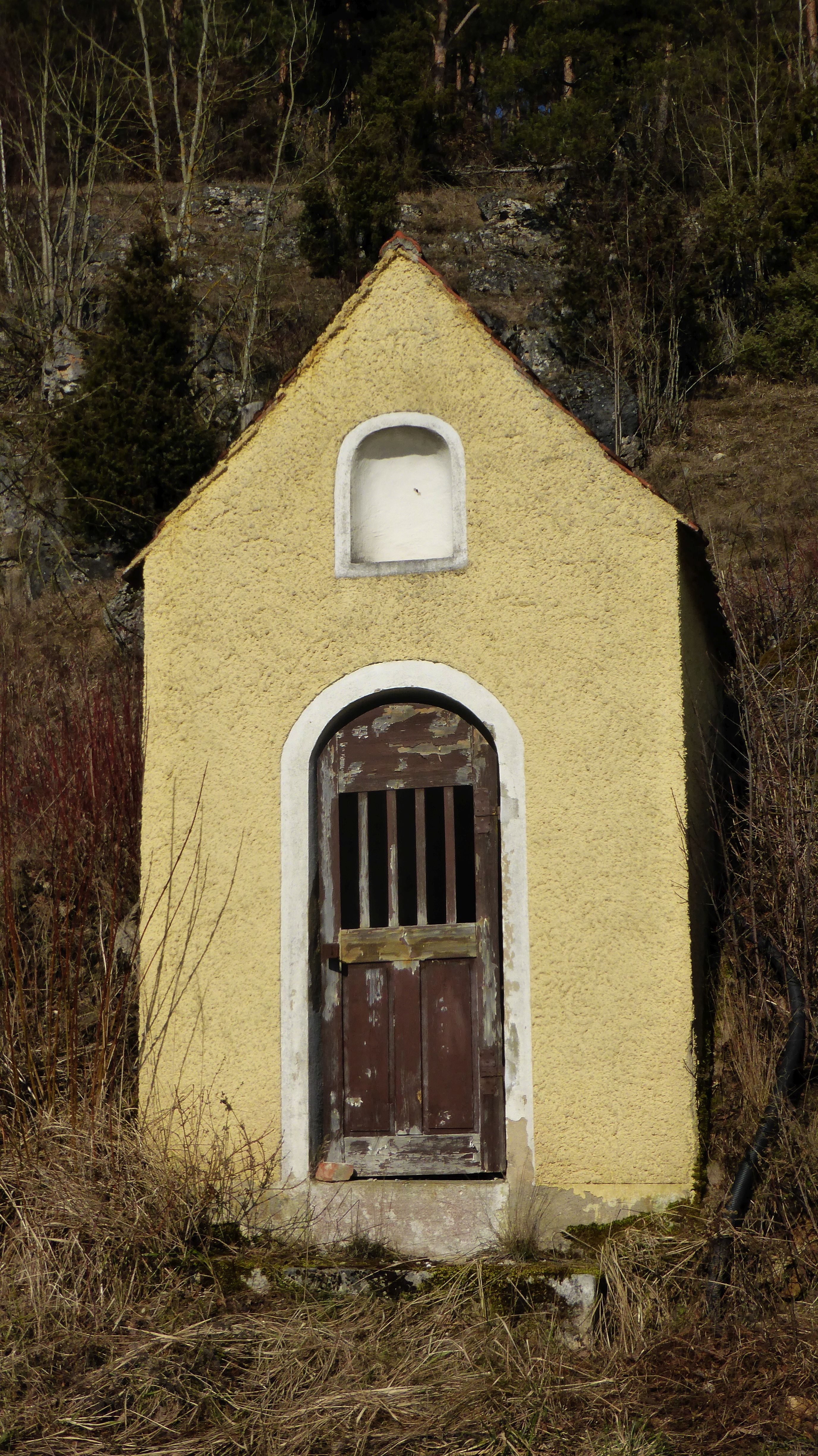 Friesmühle (Holzheim)